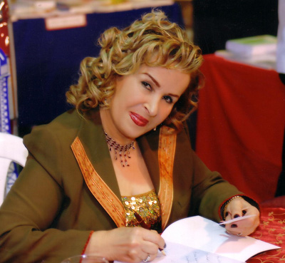 Photo d'Ezza Agha-Malak lors de la signature d'un de ses ouvrages.